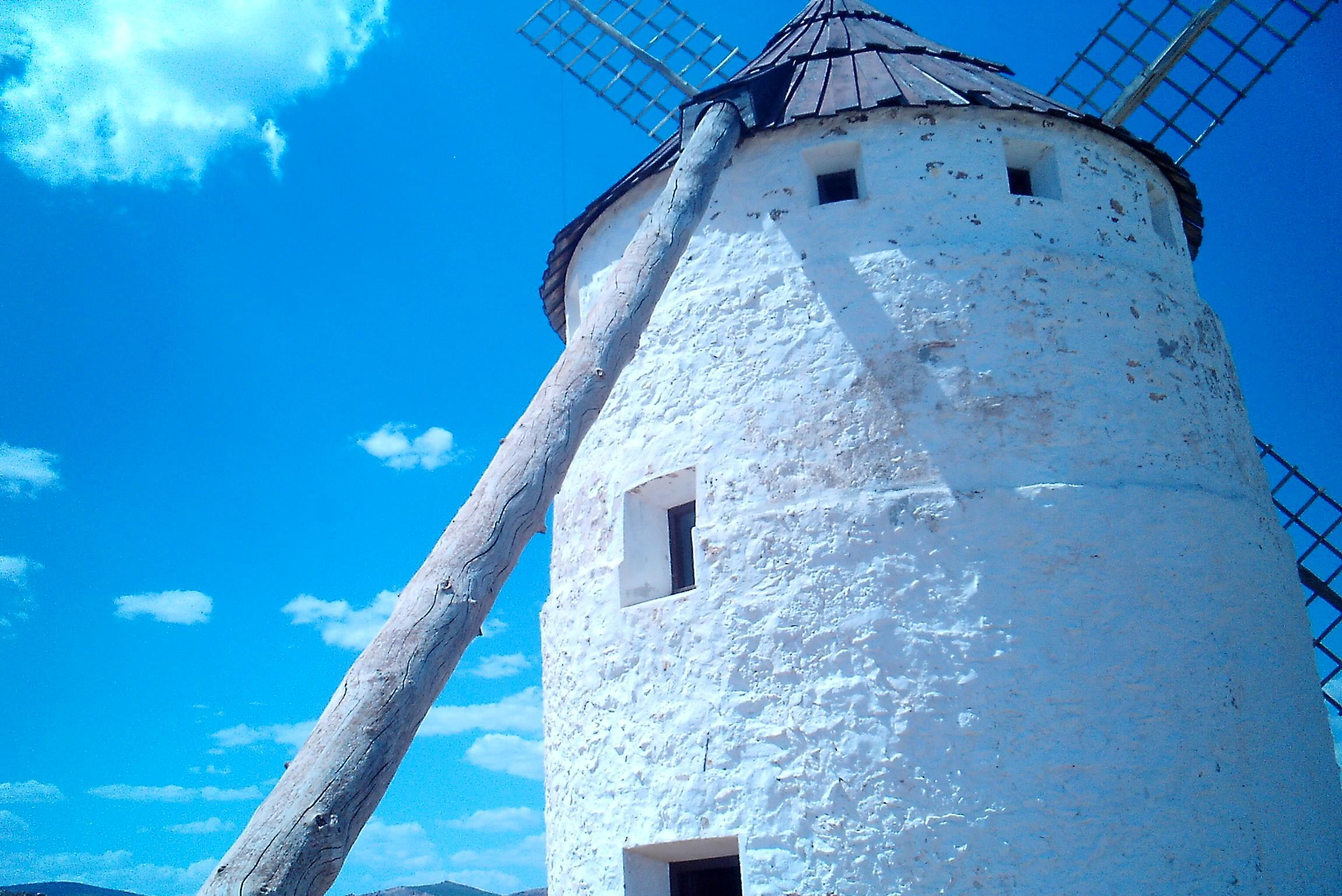 Imagen del Molino de Viento de Ojos Negros (Parte Trasera).